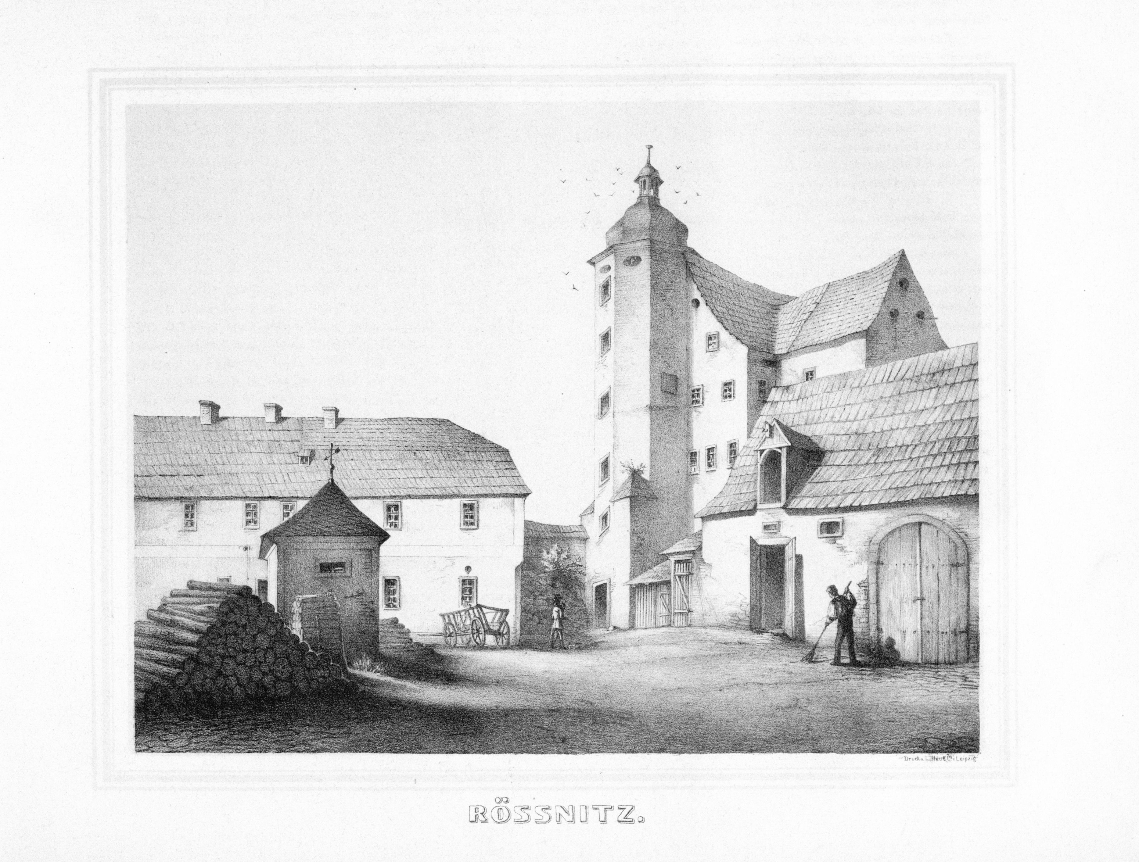 Rössnitz aus: Album der Rittergüter und Schlösser im Königreiche Sachsen Voigtländischer Kreis Section: V